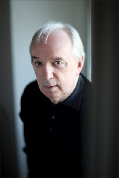 POrtrait Franck Venaille